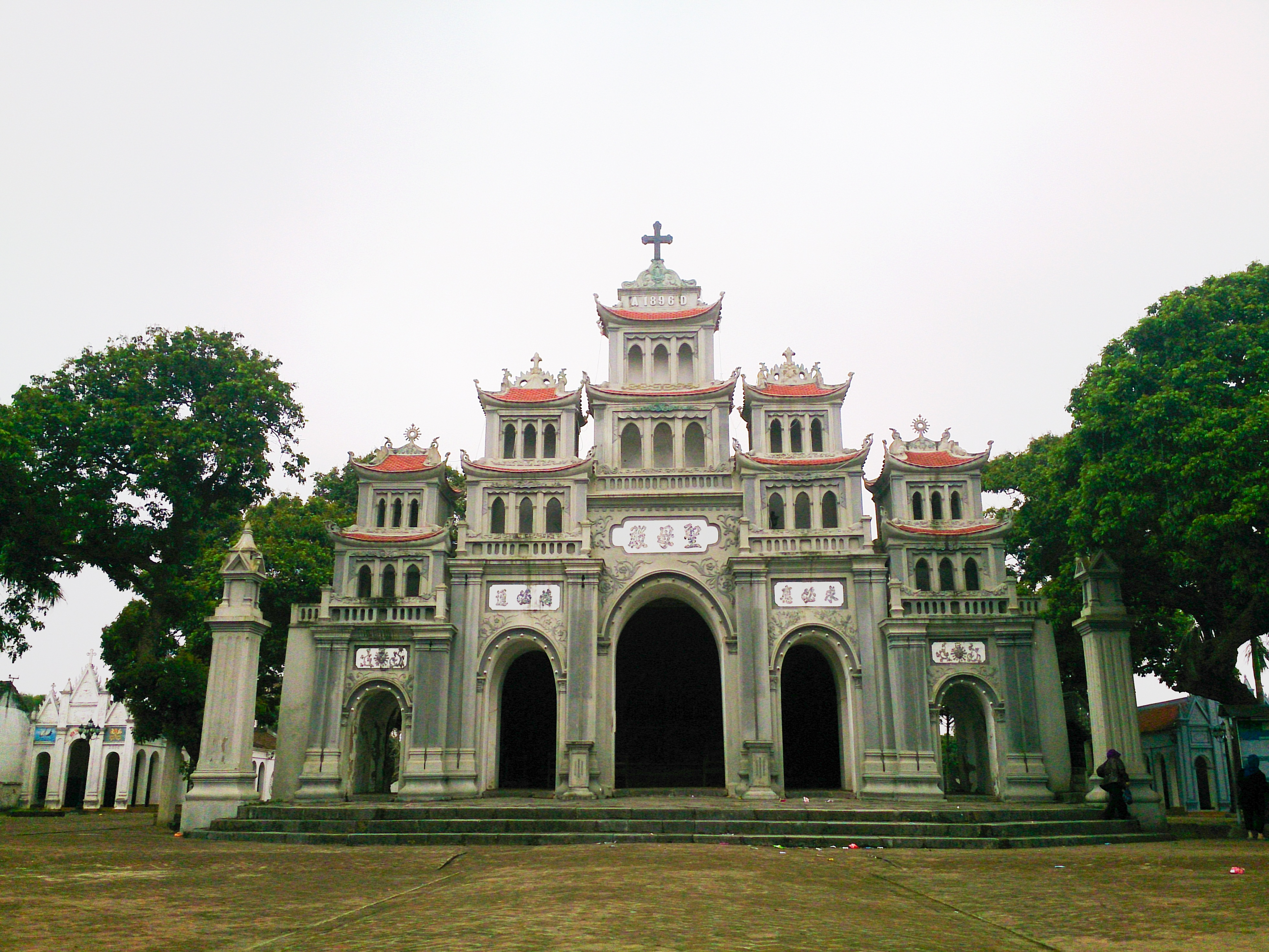 Nhà thờ Vĩnh Trị là nhà thờ lớn của Giáo xứ Vĩnh Trị (Kẻ Vĩnh), tại huyện Ý Yên, tỉnh Nam Định.